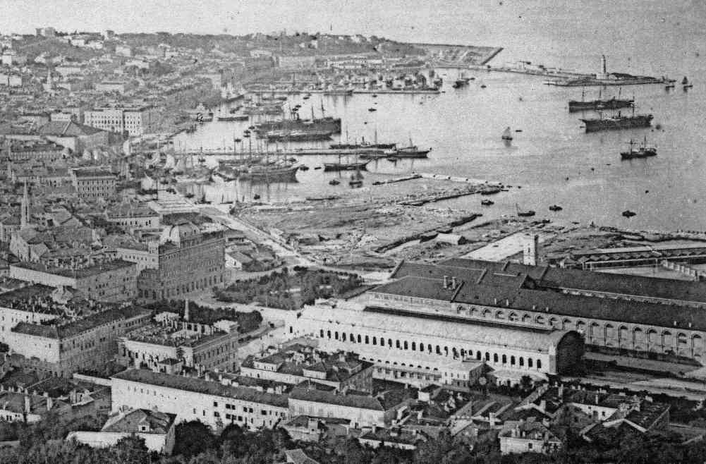 Veduta del torrente Grande, ancora scoperto nella sua parte finale, circa 1890